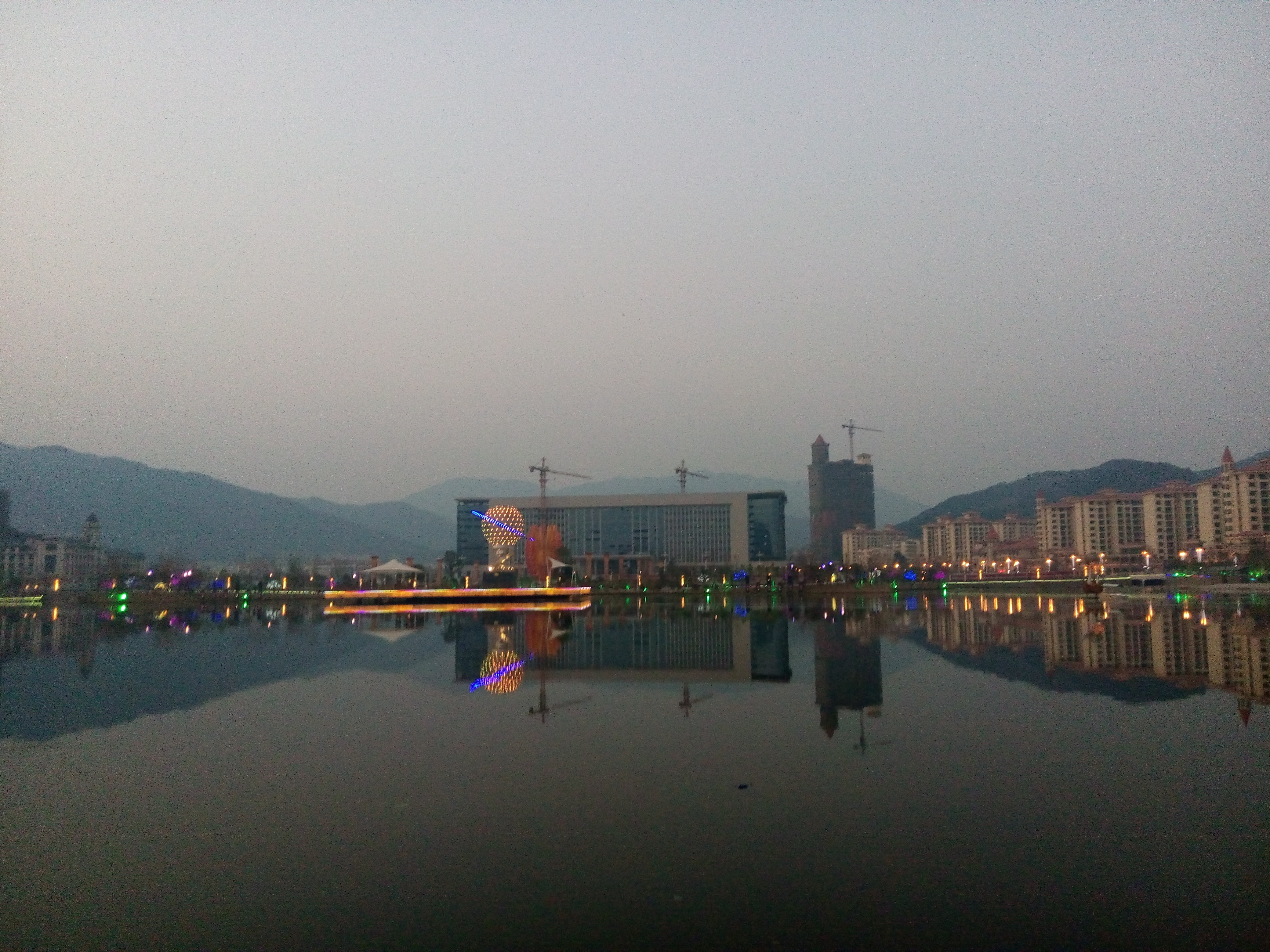 湾里区岭秀湖